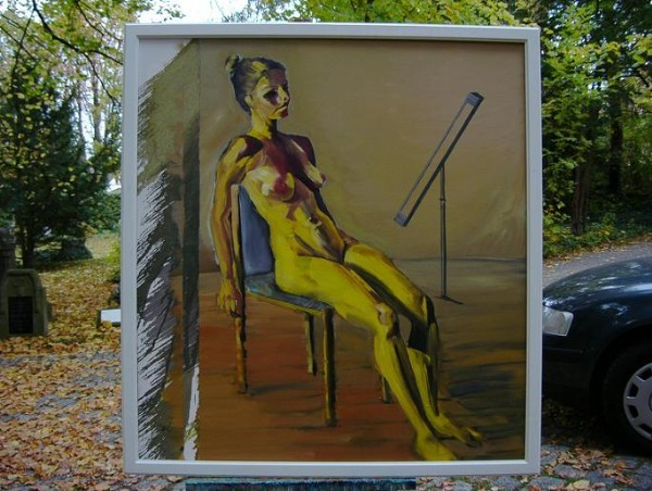 Ölgemälde von Mehmet Alagöz